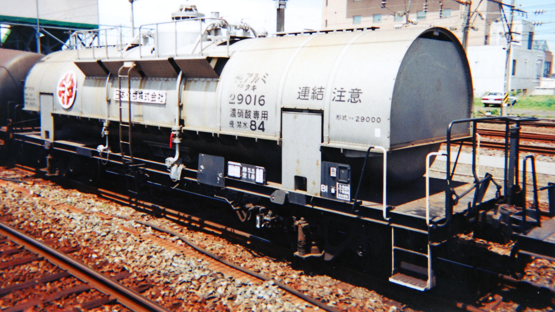 タキ29000形タキ29016。原ノ町駅にて。 ※下の写真とほぼ同時に撮影されたものか。この車輌はタキ10469の隣に連結されていたものである可能性が高い。